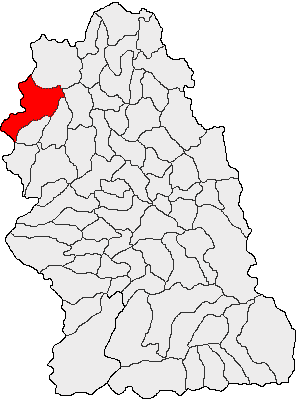 Categorie:Hărţi ale judeţului Hunedoara